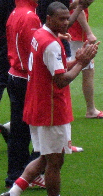 Julio Baptista